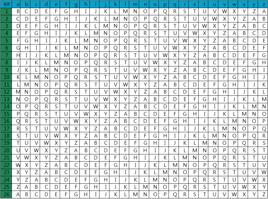 비제네르표